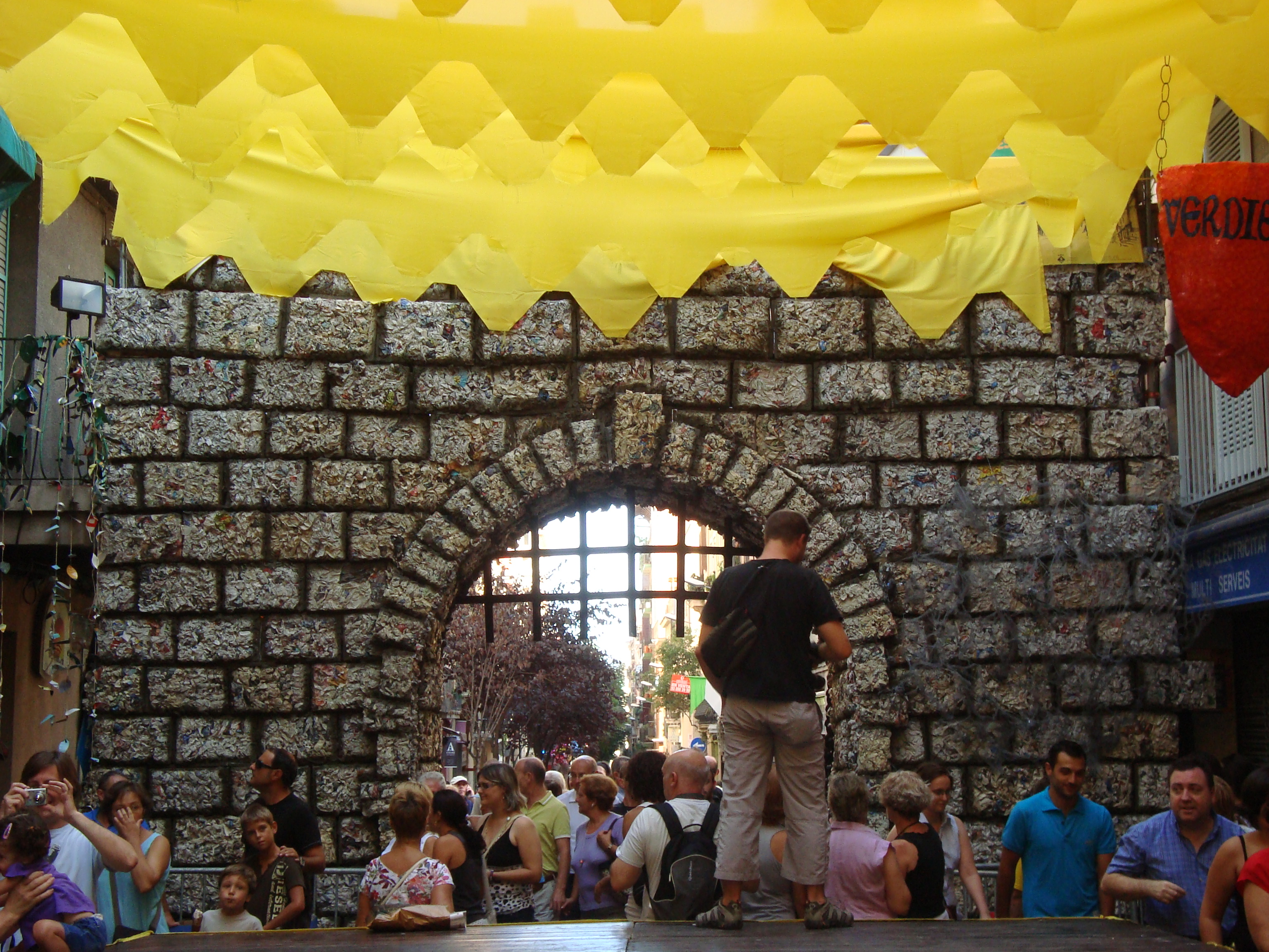 Fotografia del carrer Verdi a les Festes de Gràcia.